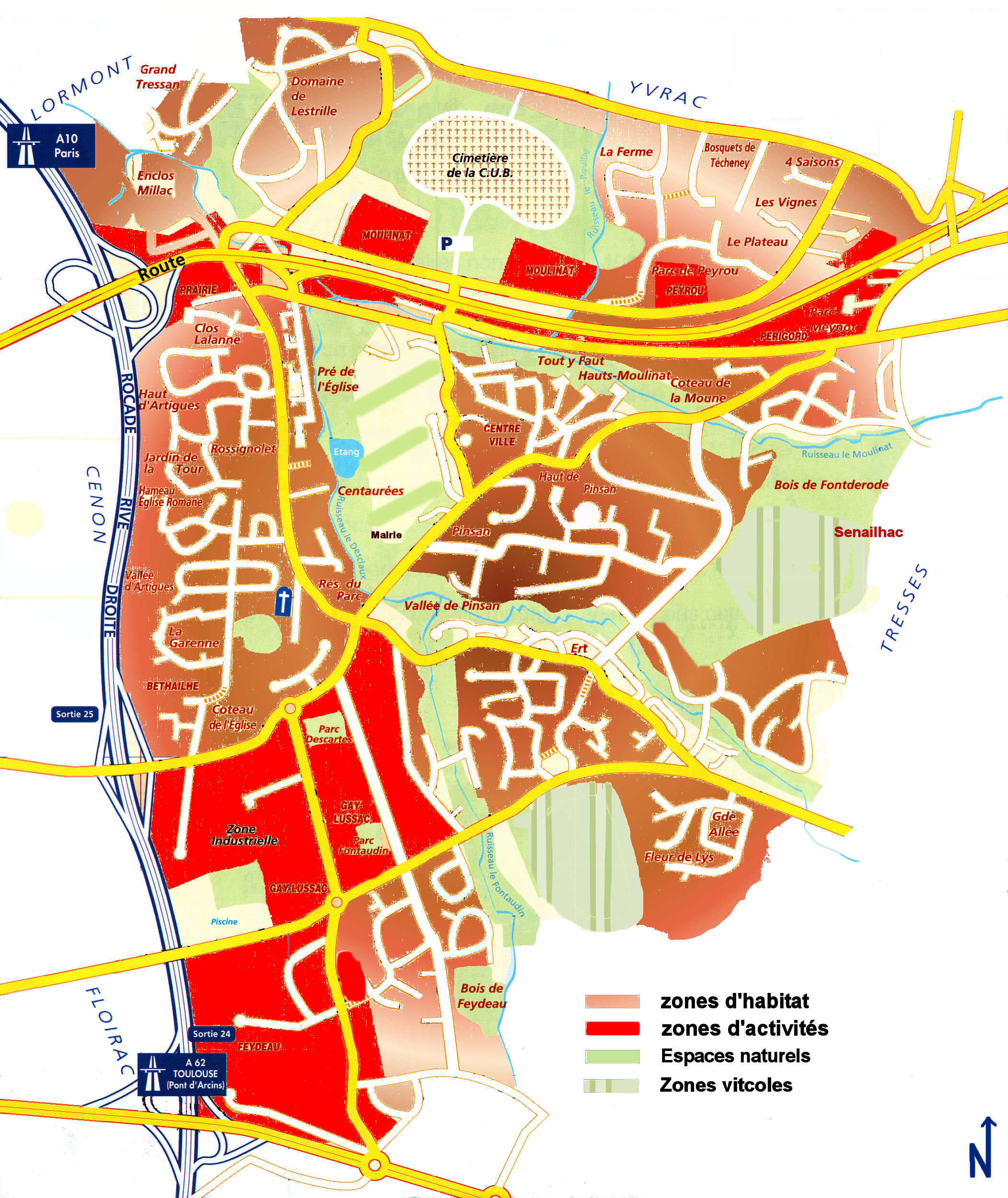 Carte de la commune de Tresses